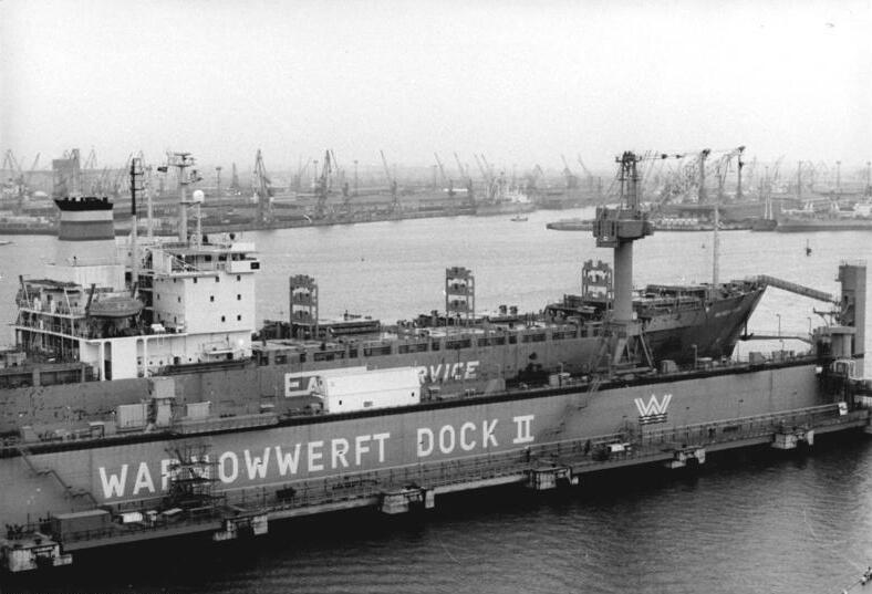 Warnemünde, Warnow-Werft, Schwimmdock ADN-ZB Sindermann 16.11.89 Rostock: Warnow-Werft-Das neue Schwimmdock der Warnow-Werft ist in der Lage, alle Großschiffe der DDR-Handelsflotte - wie die fast 200 Meter langen Eisenbahngüterfähren - einzudocken. Höchste Auslastung ist oberstes Prinzip. - Siehe auch 1989-1116-12N, 14N und 15N sowie ADN-Beitrag. Information added by Wikimedia users.Containerschiff des Typs „Saturn“ in Dock